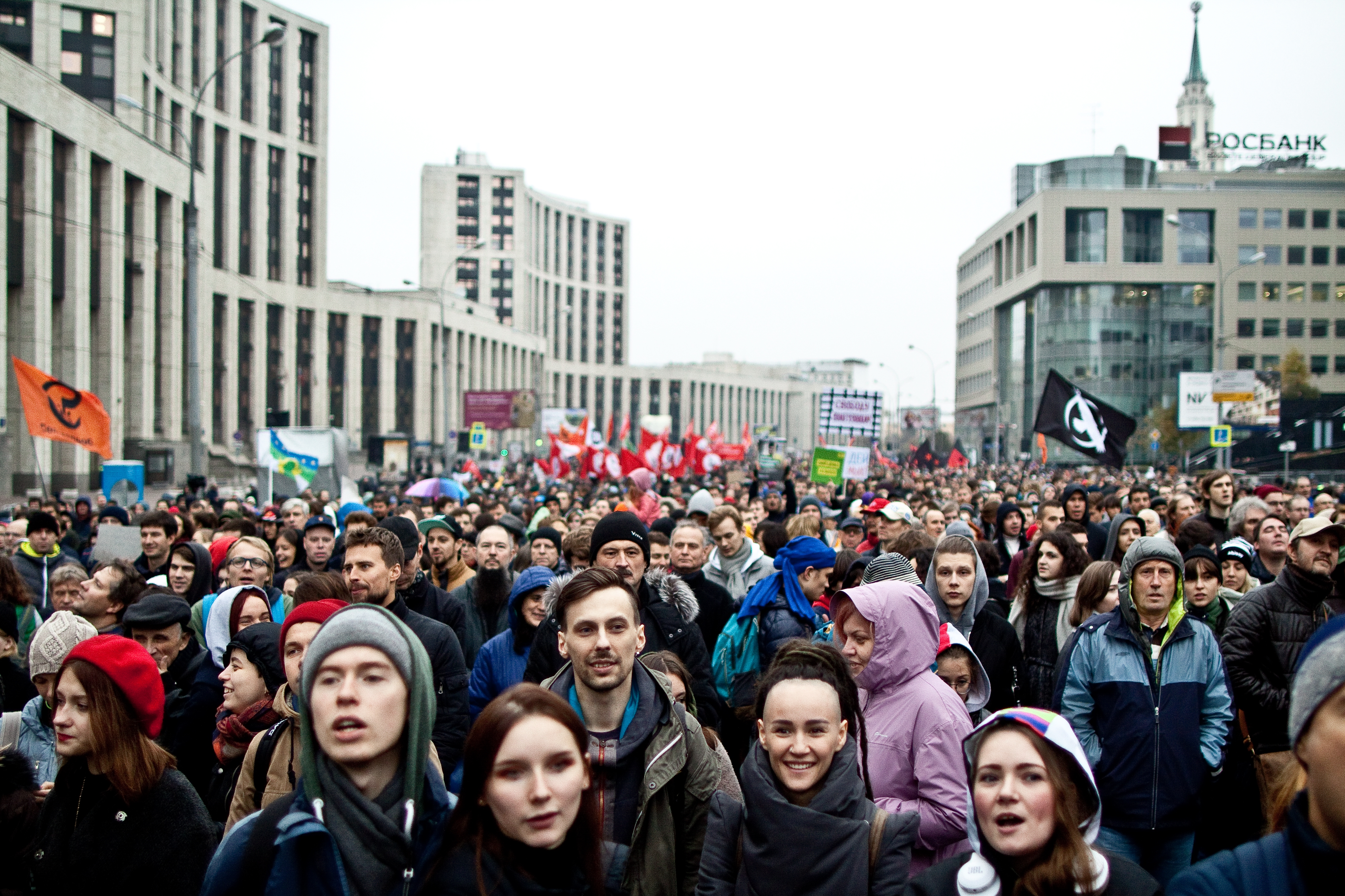 Митинг на проспекте Сахарова 29 сентября 2019 года